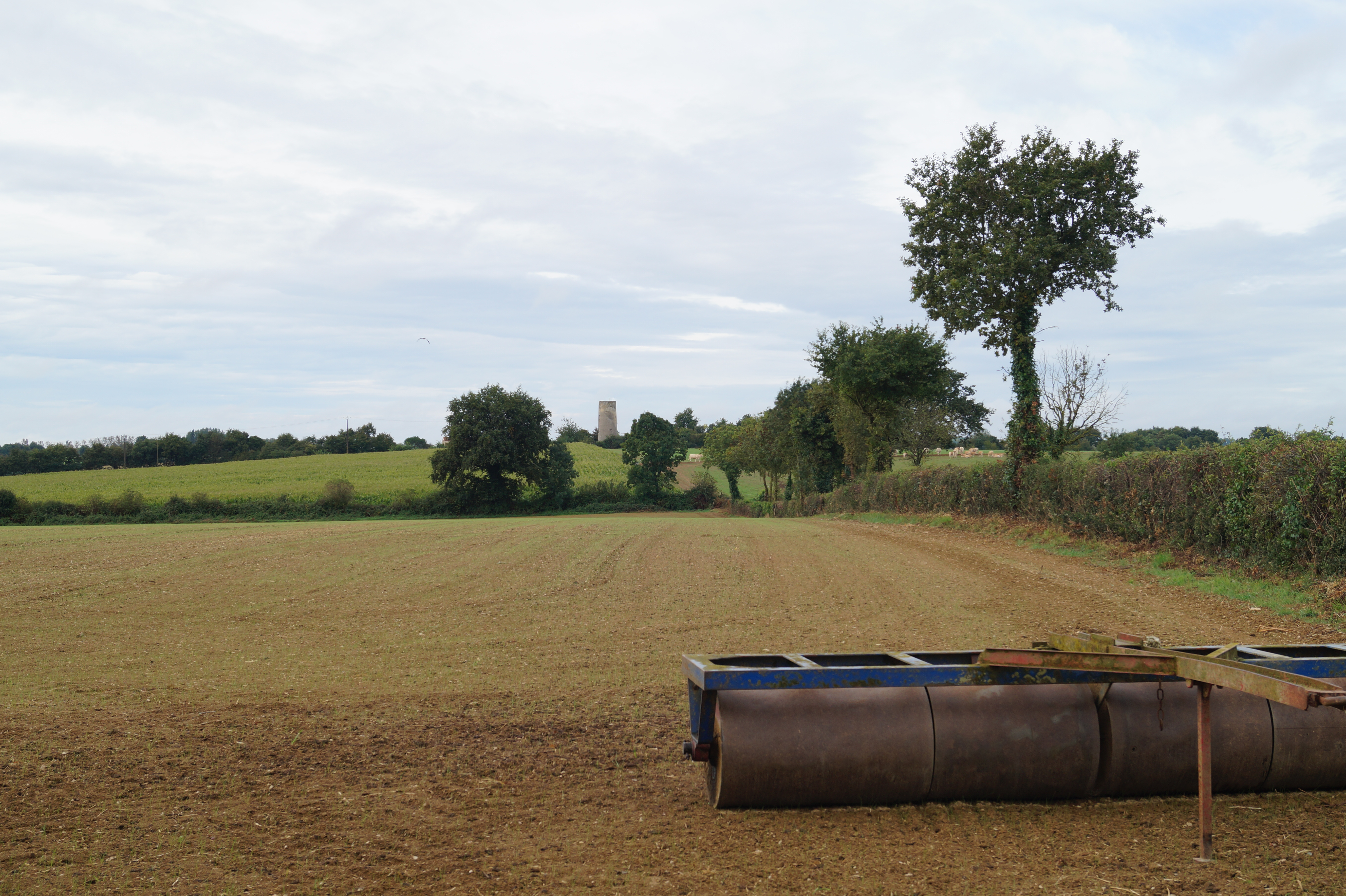 Le moulin de l’Ansonnière.